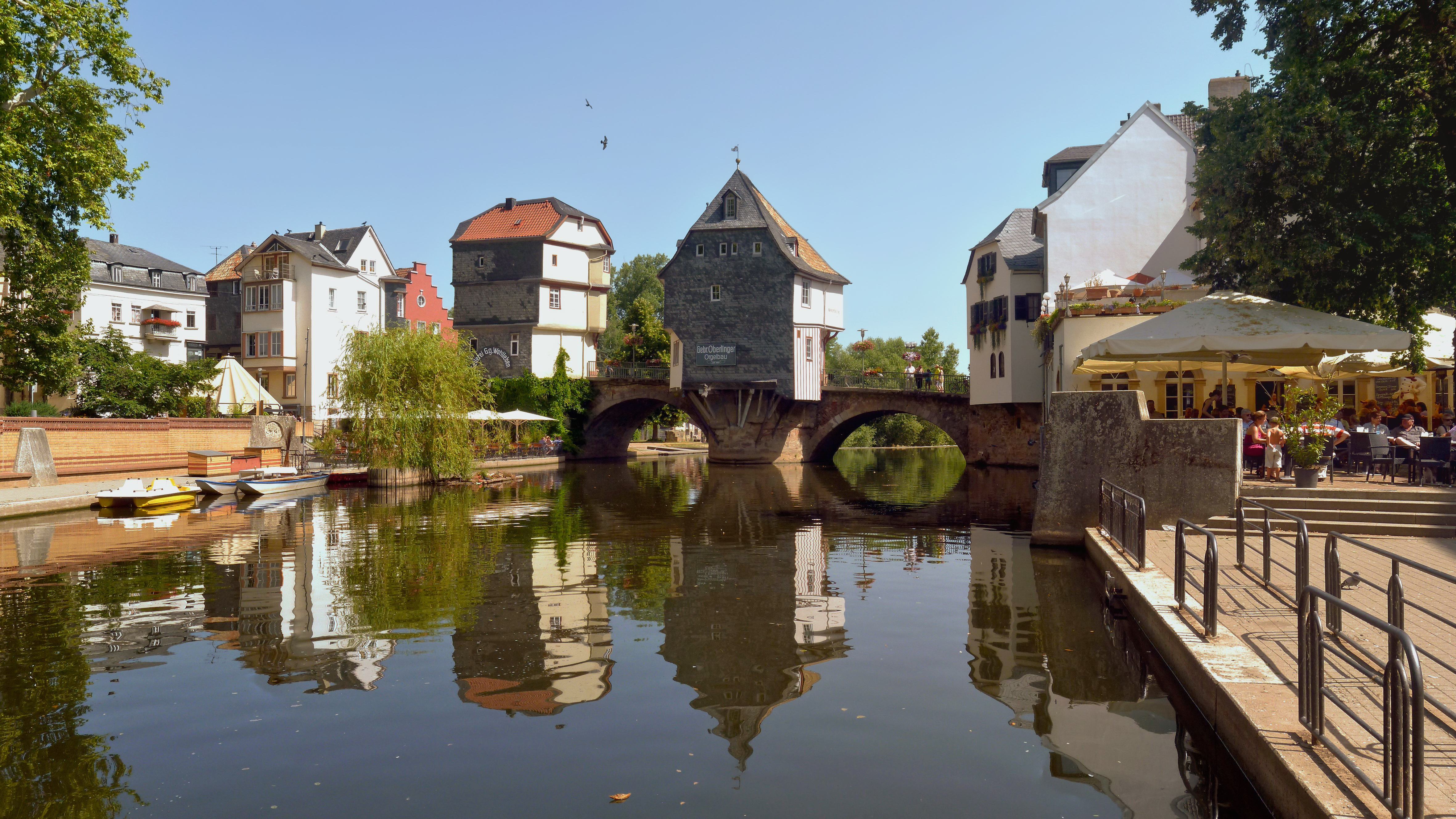 Die Alte Nahebrücke ist eine Brücke in Bad Kreuznach und gehört neben der Krämerbrücke in Erfurt und der Neckarbrücke in Esslingen zu den noch bestehenden Brücken, die mit Häusern bebaut ist. Die Steinbrücke hat eine Länge von 135 Meter und führt über die Nahe und dem Mühlenteich, einen Nebenarm der Nahe. Erbaut wurde die Brücke 1332 und diente als Ersatz für eine Holzbrücke.